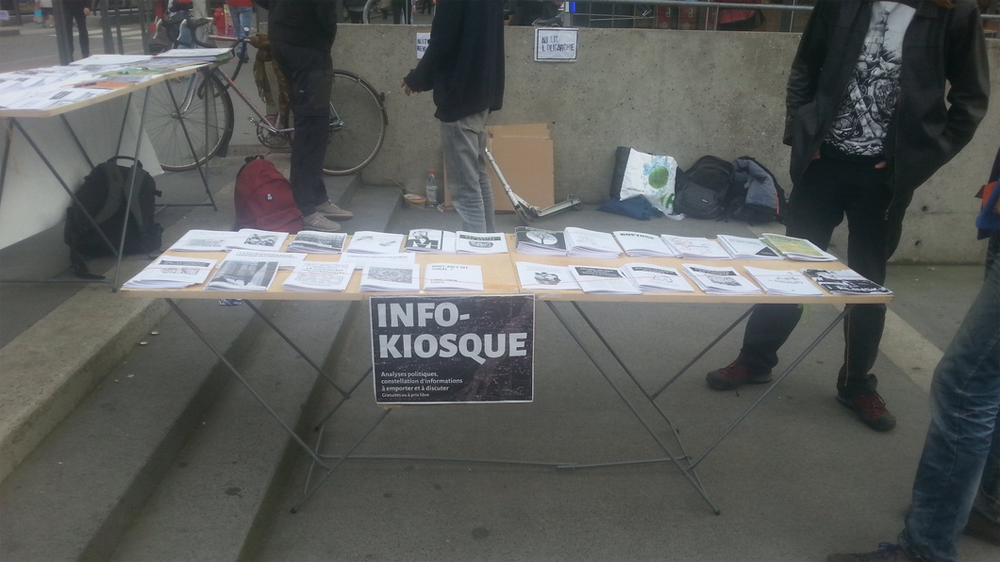 Exemple d'illustration d'une table d'infokiosque.